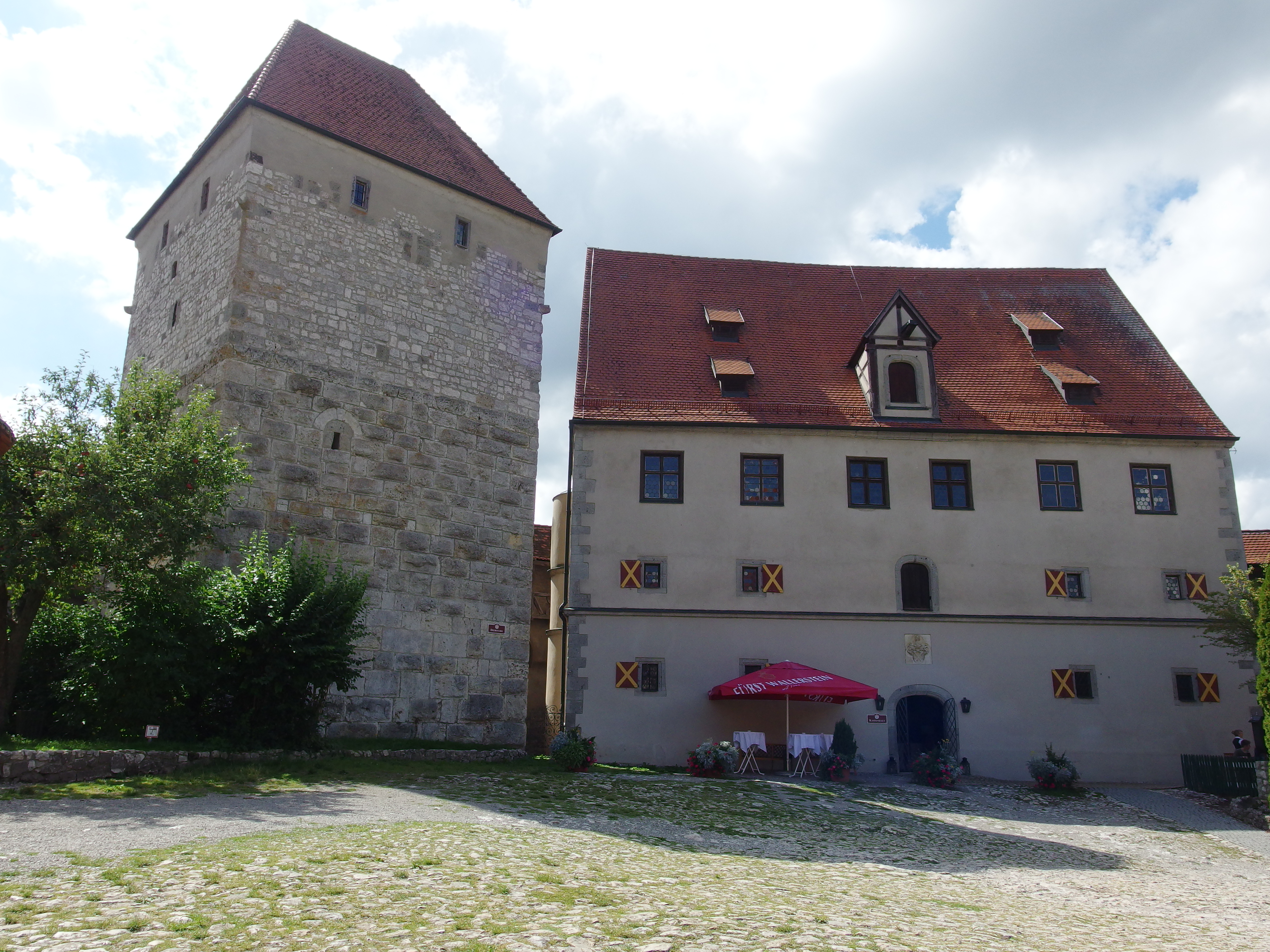 Harburg, Schloß Harburg, Bergfried und Kastenhau; von NordostThis is a photograph of an architectural monument.